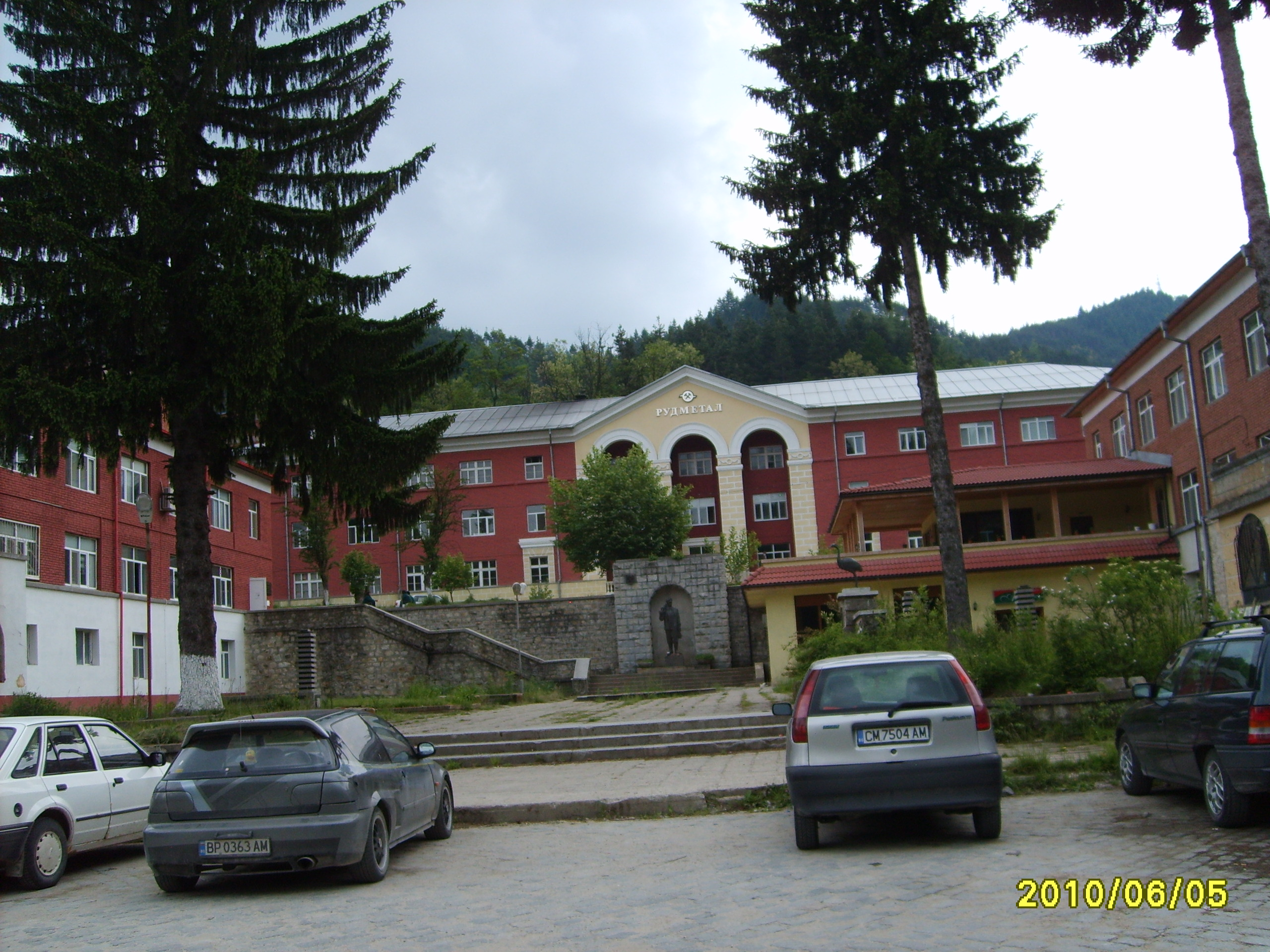 Корпусът на Рудметал в Рудозем.